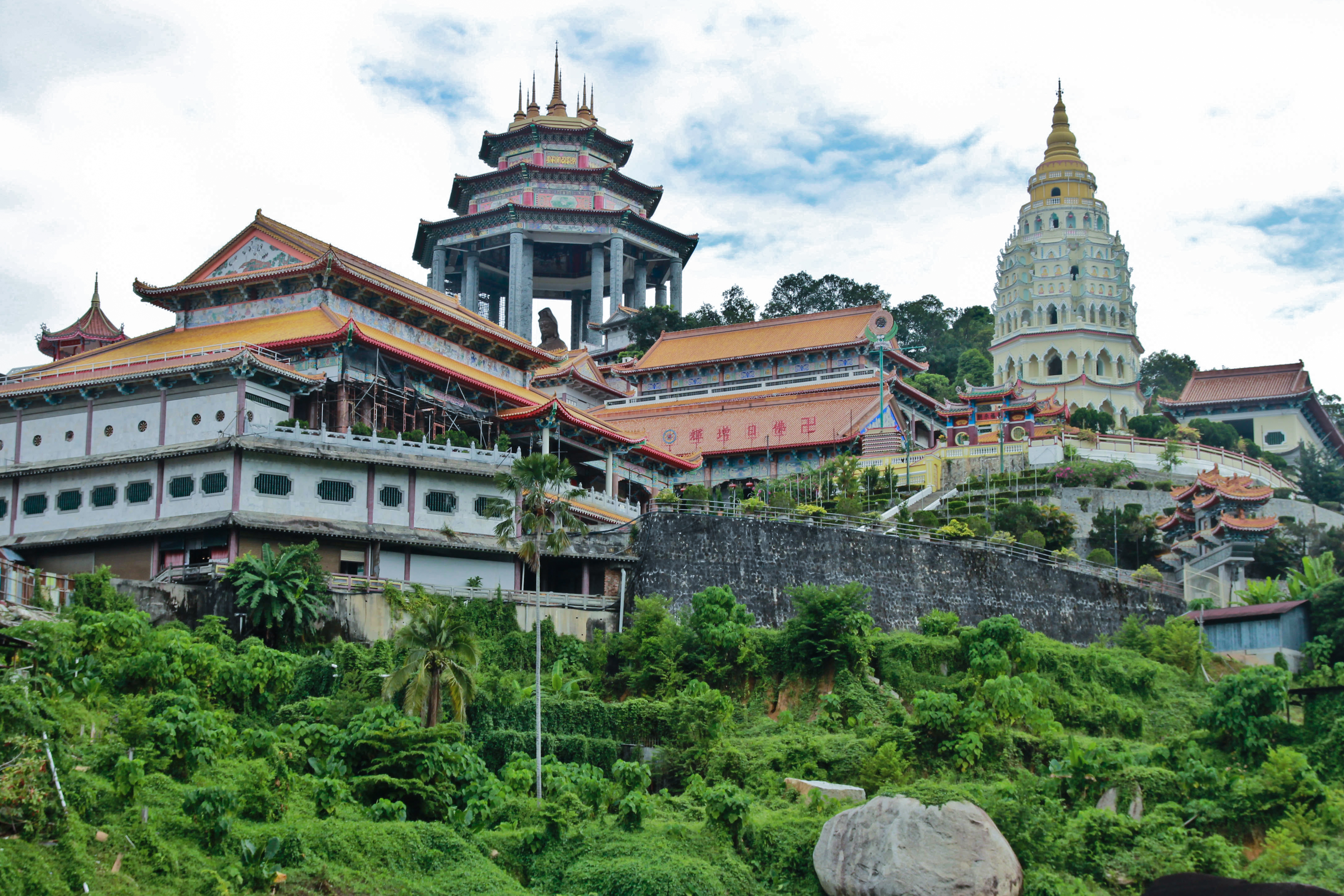 Kek Lok Si Tempel, Georgetown, Penang